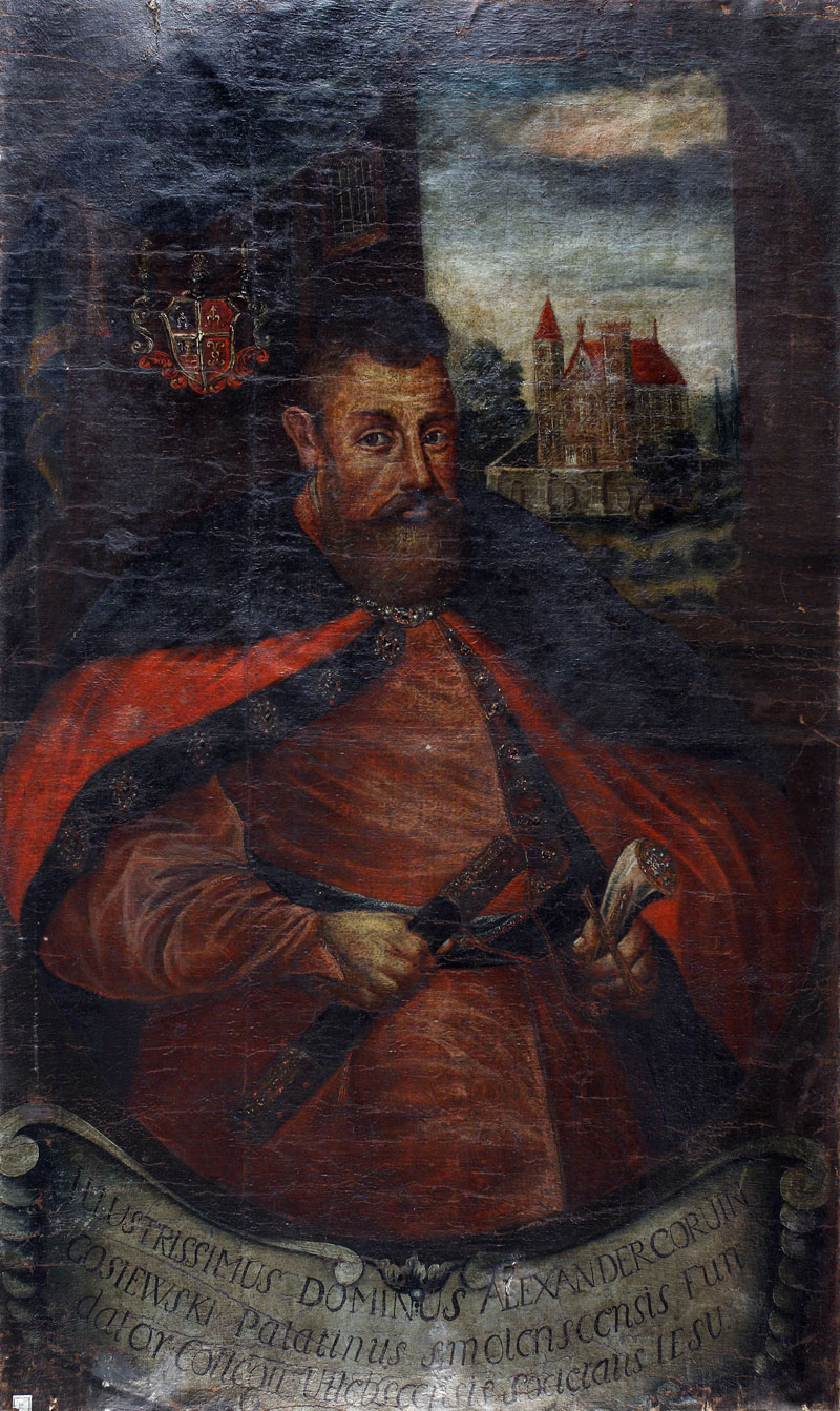 Беларуская (тарашкевіца): Партрэт Аляксандра Корвін-Гасеўскага (Alaksandar Korvin-Gasieŭski)